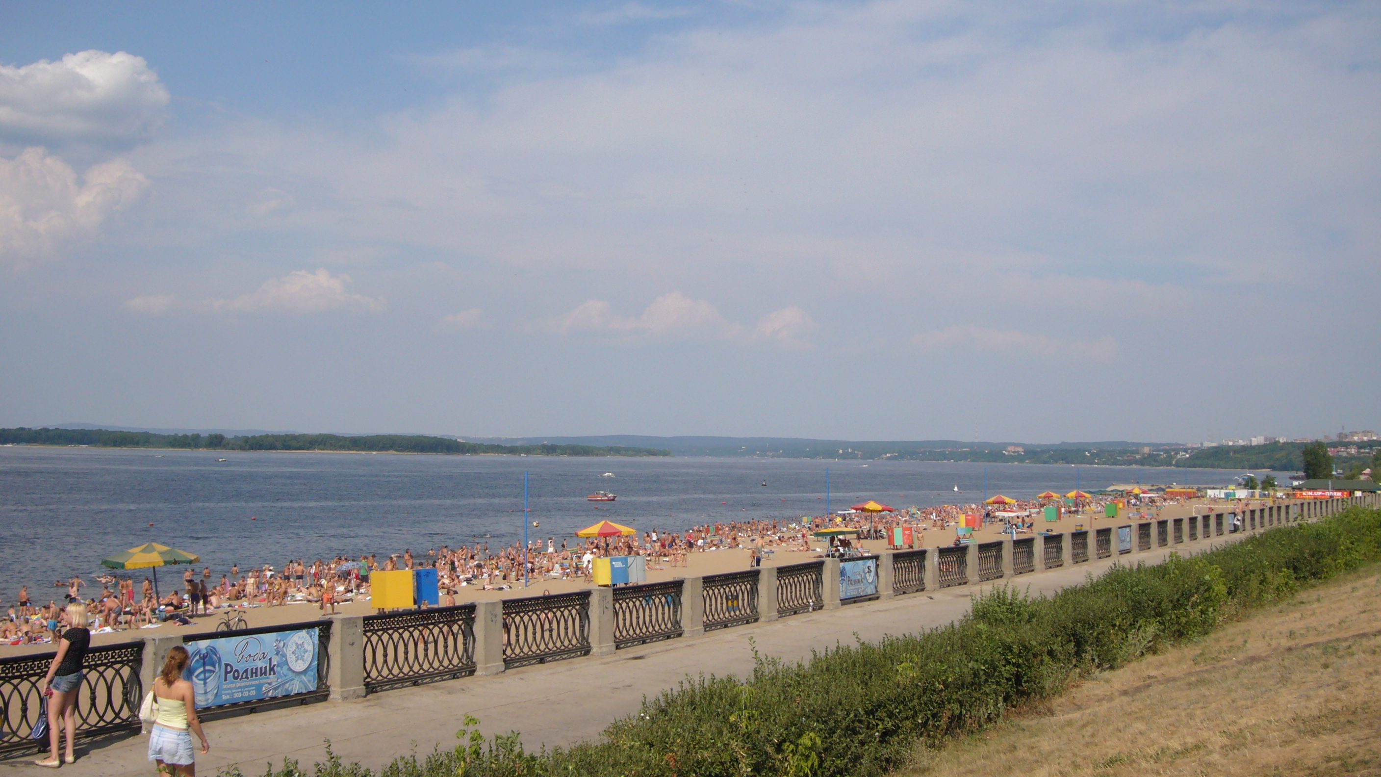 Набережная реки Волги в Самаре